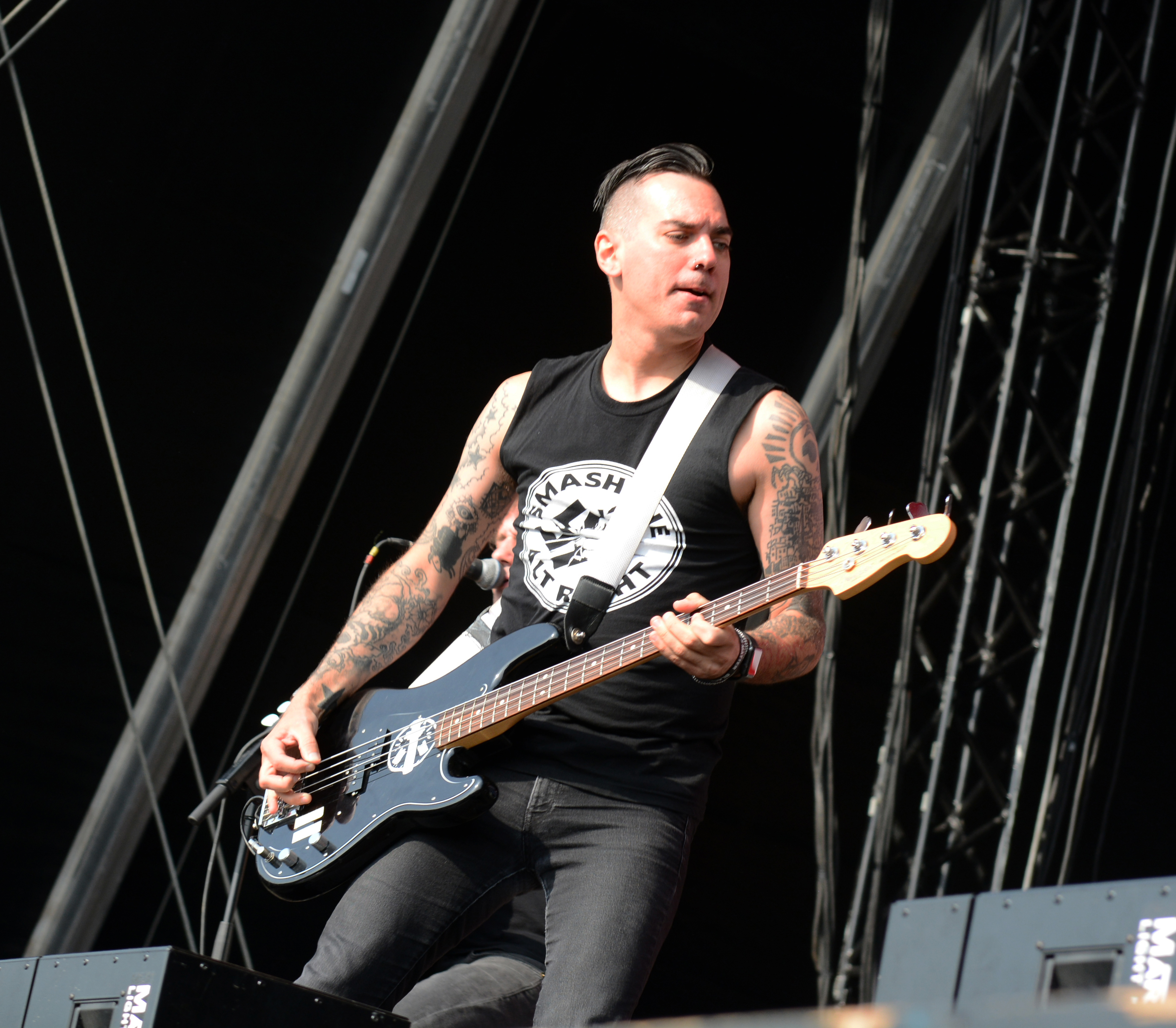 Anti-Flag beim Reload Festival 2017